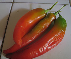 Bitxo, fruit de la bitxera